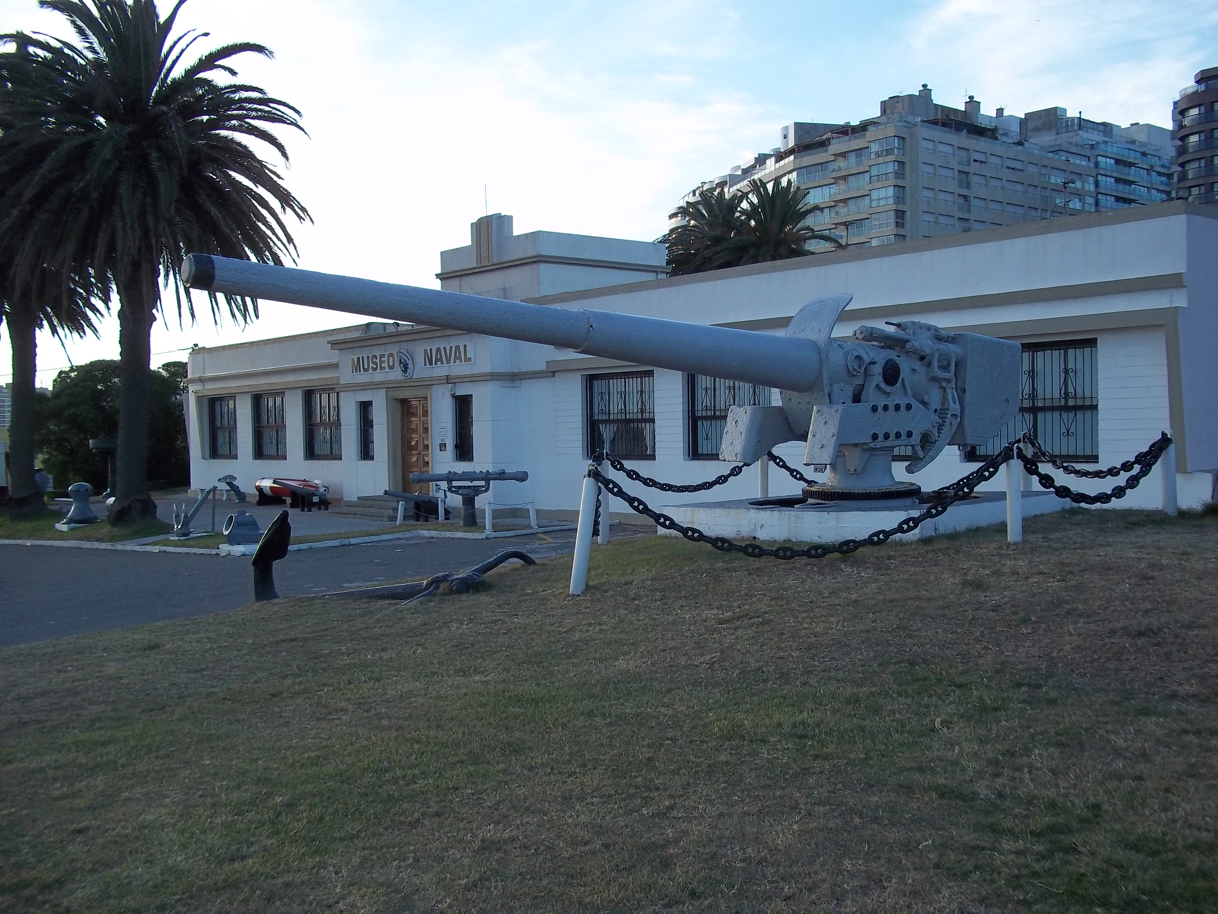 Cañón de 150mm perteneciente al Acorazado Admiral von Graf Spee, hundido en la Batalla del Río de la Plata el 13 de diciembre de 1939 frente a Punta del Este. El cañón se encuentra ubicado en la puerta del Museo Naval de Montevideo, Uruguay.